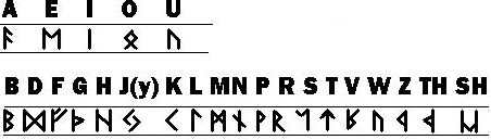 оркские руны. Властелин колец